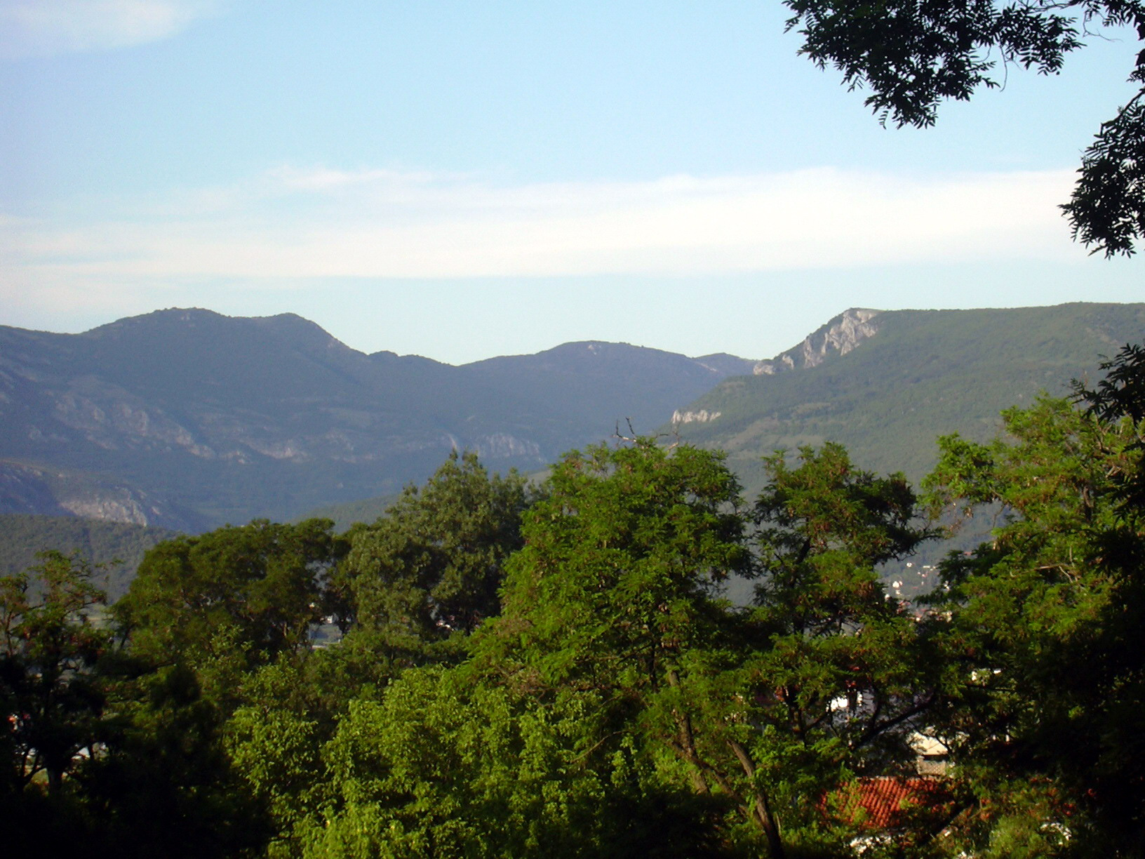 Niska Banja